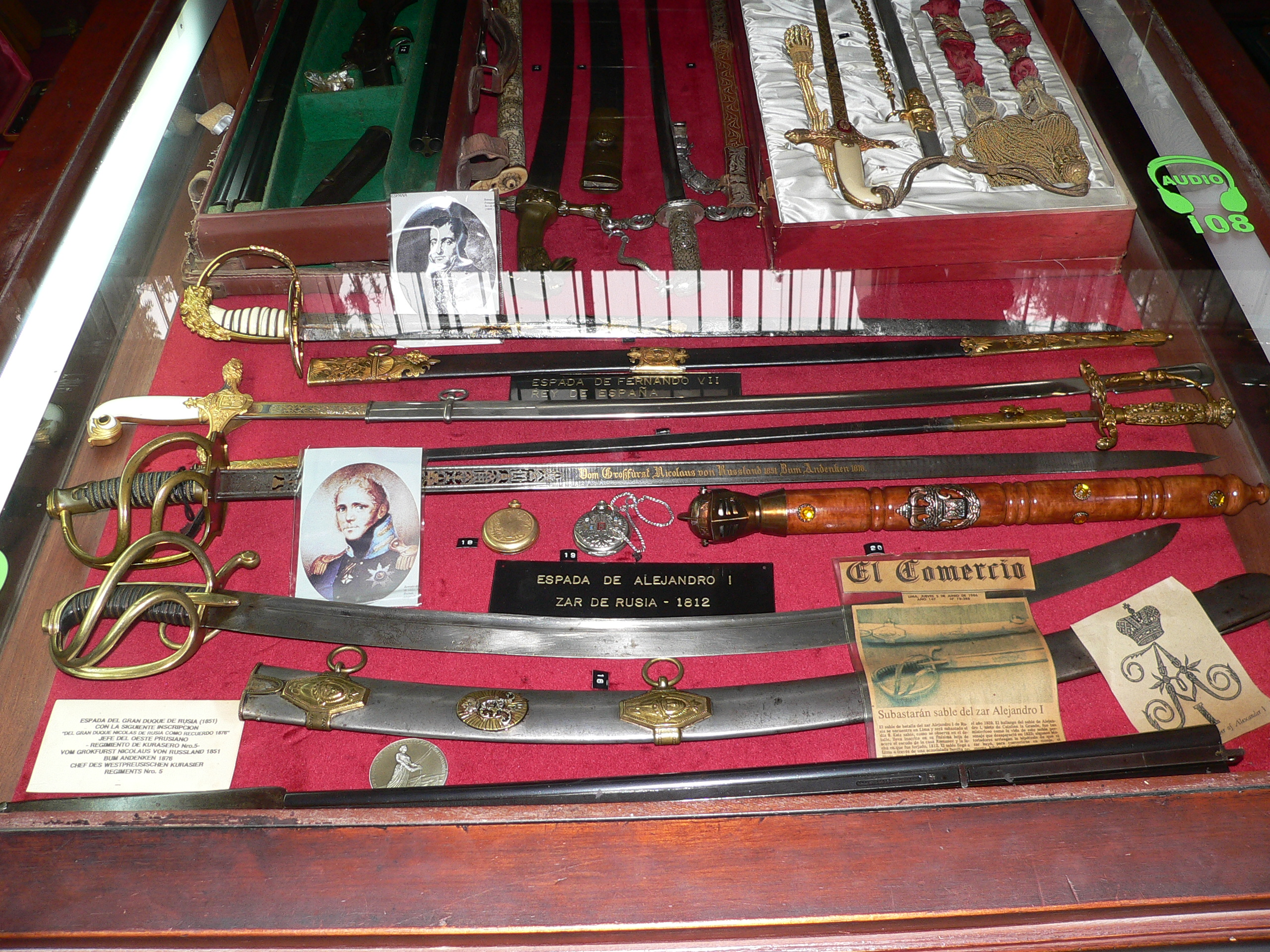 Descripción